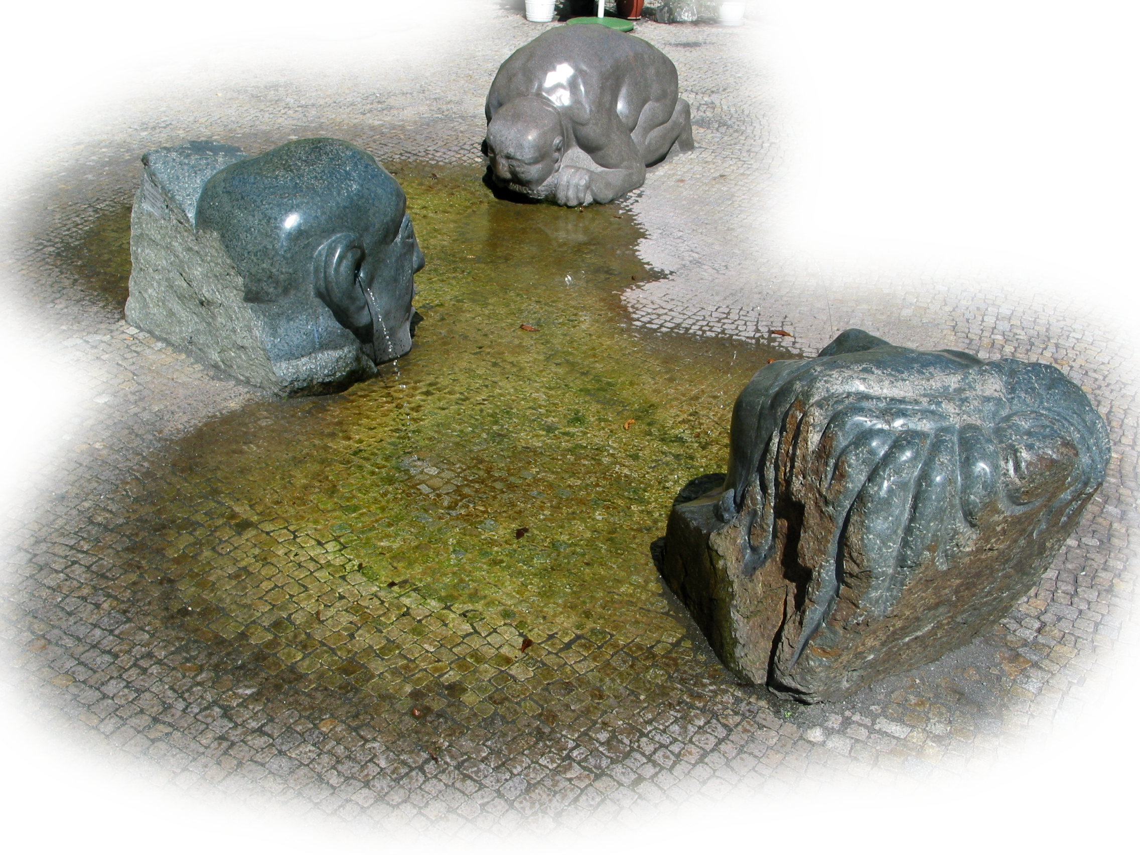 Das Wasserspiel "Schlucken und Spucken" (von Walter Sachs, 2007), vor dem Haus zum Siechen Bräu in Weimar. Hier fließt Trinkwasser aus Ohren und Mund der Steinköpfe.